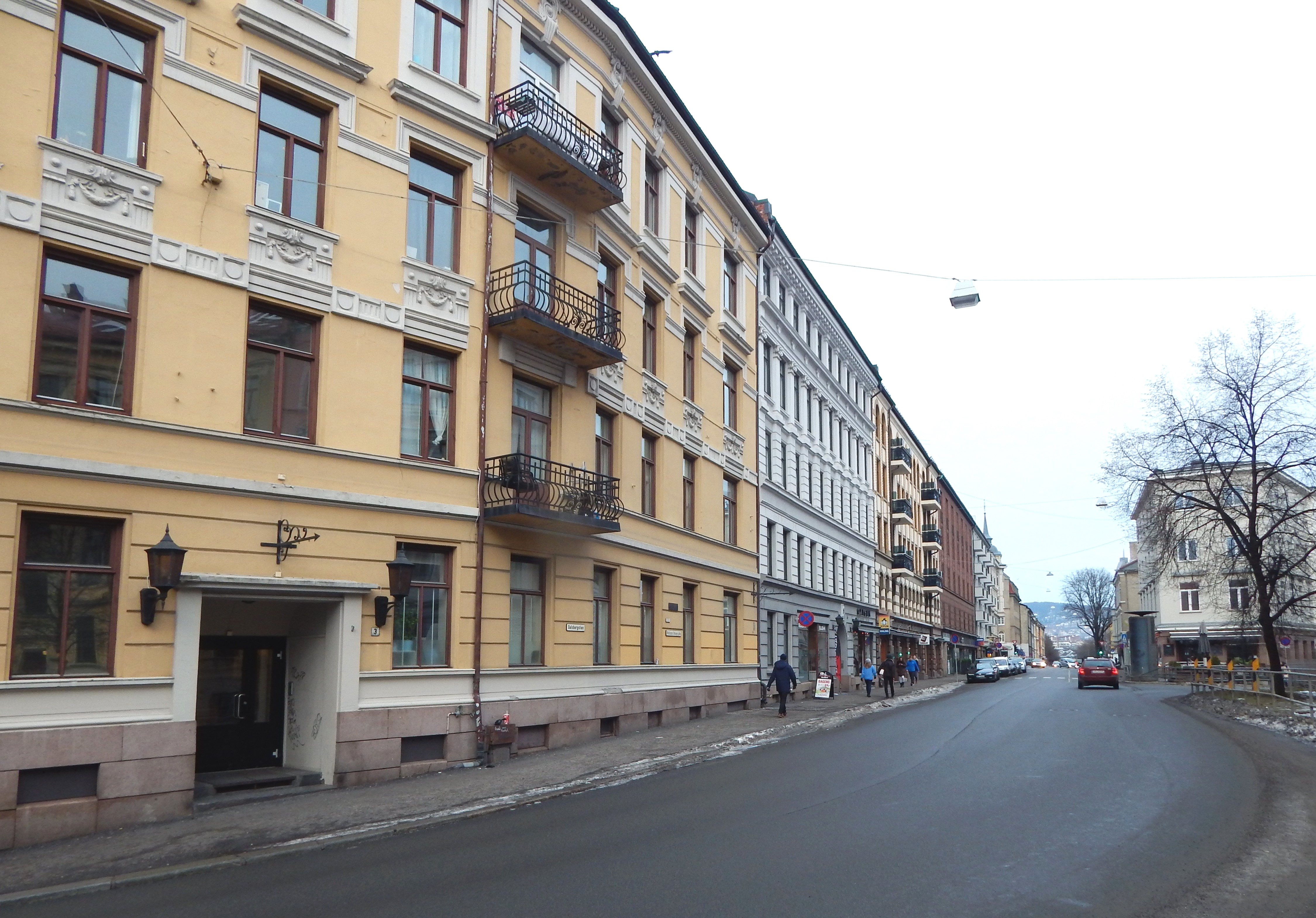 Dalsbergstien mot Sankthanshaugen